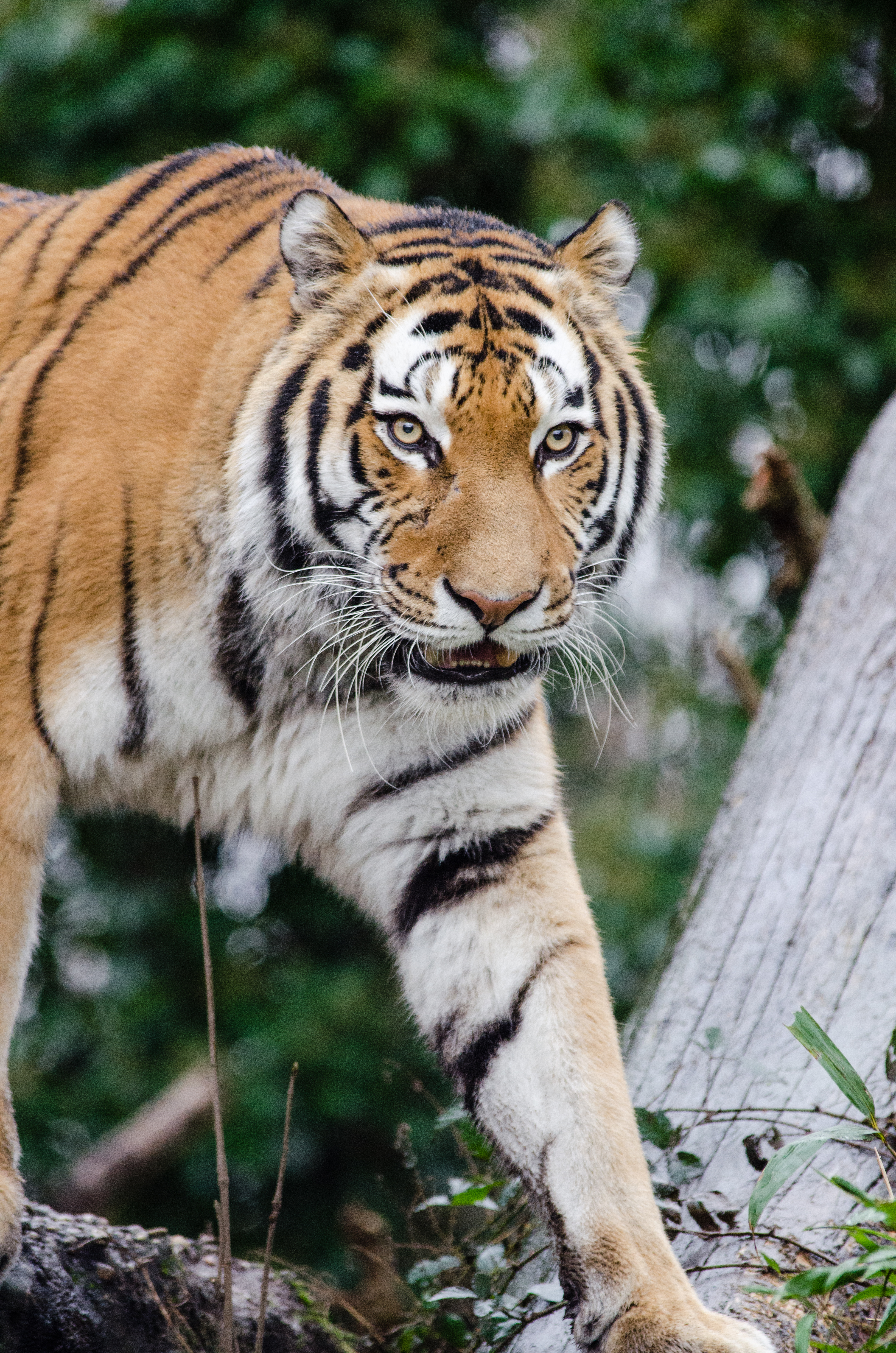 Tiger